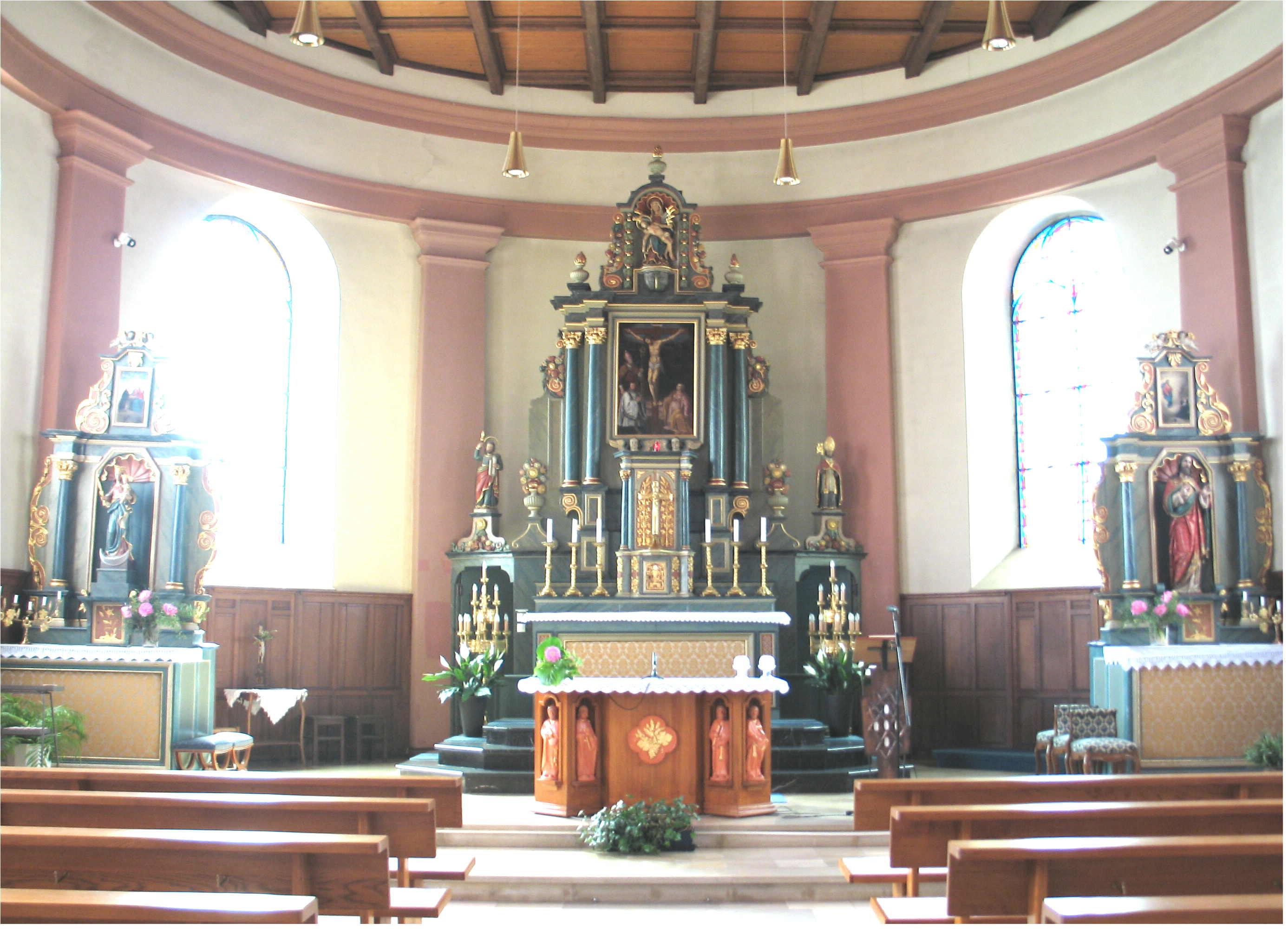 Sujet : Kierch vu Nouspelt.